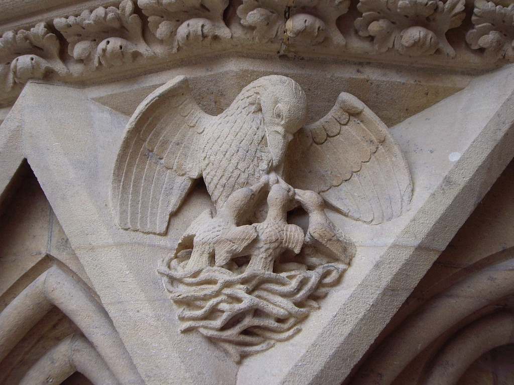 Pélican s’ouvrant les entrailles pour nourrir ses petits.